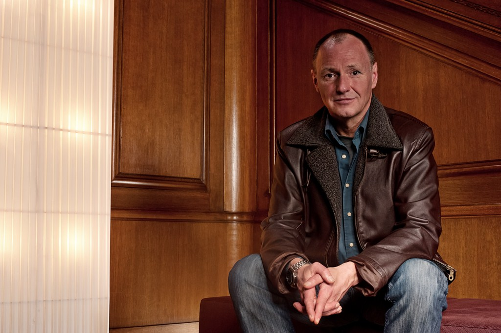 Lektor und Ghostwriter Karl-Heinz Smuda